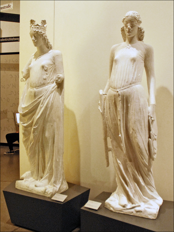 Copies des statues de l'Eglise et de la Synagogue de la cathédrale de Bamberg (1230 environ) La synagogue (Synagoga), qui personnalise la foi juive, est le personnage de droite sur la photo avec un bandeau sur les yeux, une lance cassée à la main droite et cinq tablettes qui s'échappent de sa main gauche. Son aveuglement est l'expression de son refus de reconnaître dans le Christ le Messie attendu. L'Eglise (Ecclesia) est à gauche sur la photo, elle porte une couronne, signe de sa victoire. _________________ La muséographie de l'exposition "2000 ans d'histoire germano-juive a été réalisée par l'agence Würth § Winderoll de Munich. La mise en scène des contenus est très créative, pédagogique et riche sans pour autant être surchargée. Les dispositifs multimédias qui viennent ponctuer les contenus sont nombreux et fréquemment interactifs . La présentation des 2000 ans d'histoire est en grande partie chronologique avec de nombreux approfondissements possibles et des synthèses thématiques, ce qui facilite le suivi et la compréhension d'évènements souvent peu connus du grand public. _________________ L'architecte américain, d'origine juive, Daniel Libeskind, a su trouver une harmonie entre l'organisation et la structure du bâtiment et le contenu de ce musée qui porte sur l'histoire des juifs allemands et sur le rôle joué par le judaïsme en Allemagne. C'est une réalisation exemplaire à plusieurs titres car bien peu de bâtiments construits pour abriter un musée atteignent une telle cohérence avec les objectifs de l'établissement muséographique. Site du musée voir aussi la Synagogue de la cathédrale de Strasbourg